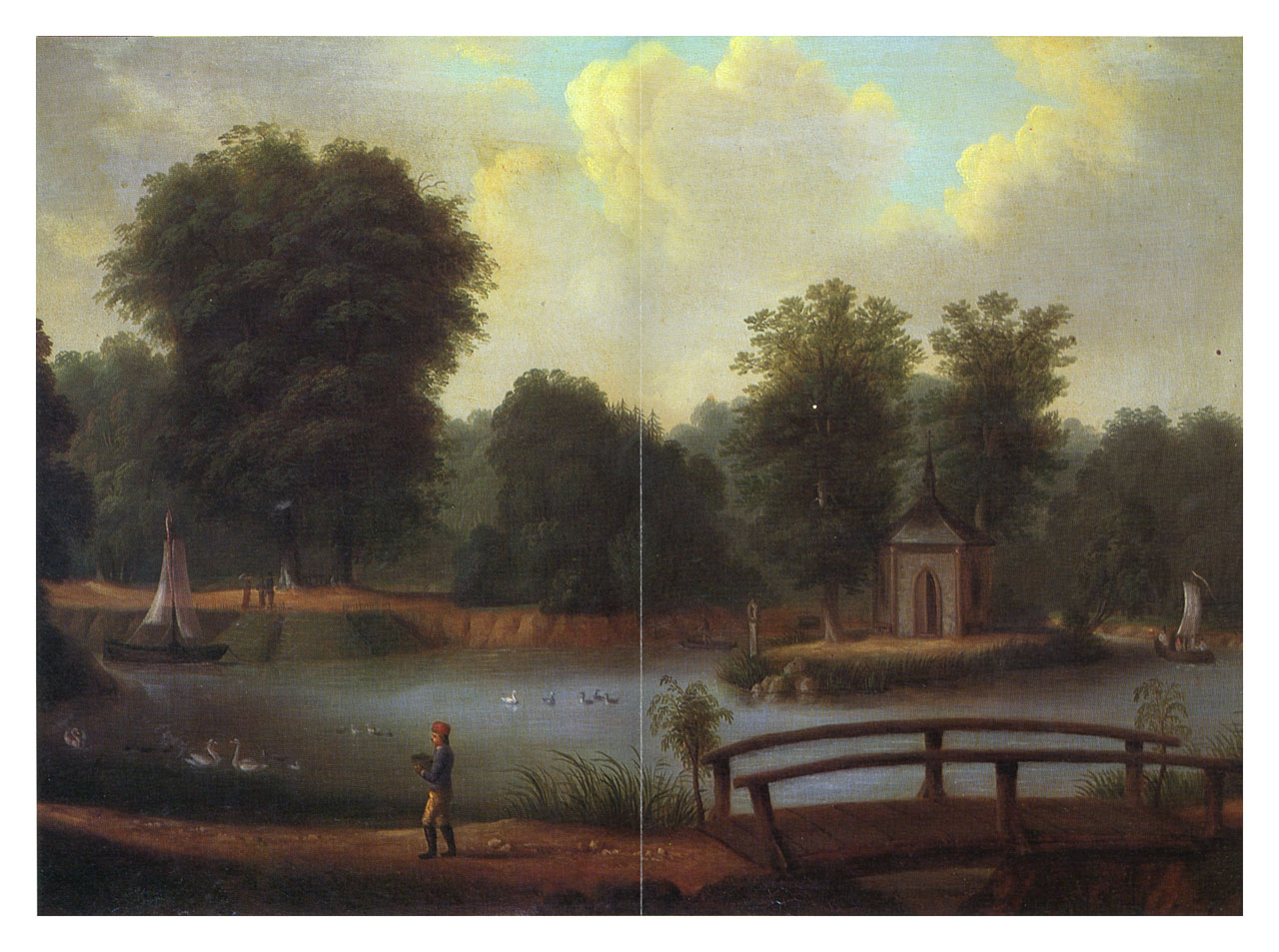 Ansicht des Eulbacher Parks nahe Würzberg